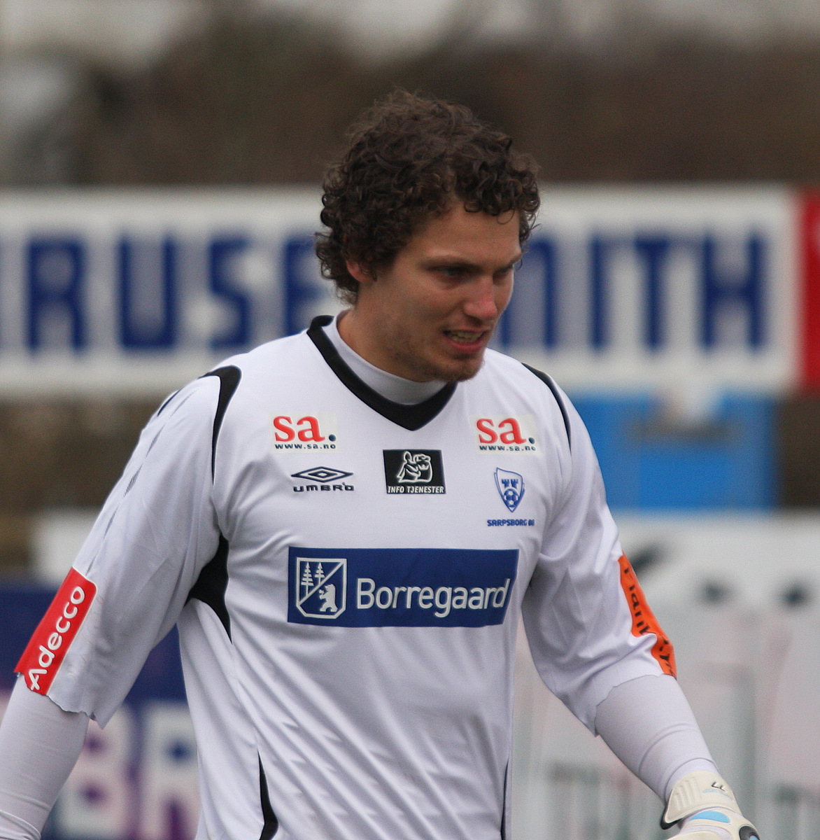 Joacim Heier, Sarpsborg